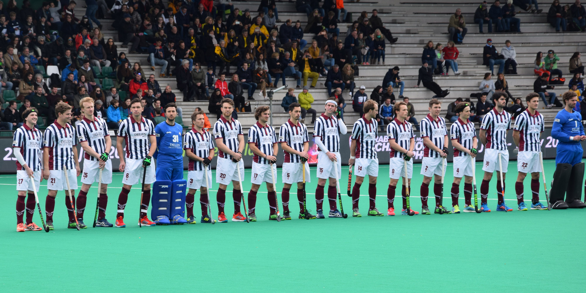 Herren Herakles HC bei der Euro Hockey League 2017/18 vor dem Spiel gegen Terrassa